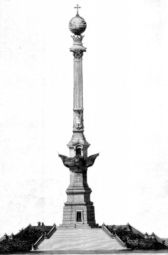 Monumento del IV Centenario del Descubrimiento de América que hizo Cristóbal Colón, frente al Monasterio de la Rábida. Pablos de la Frontera.